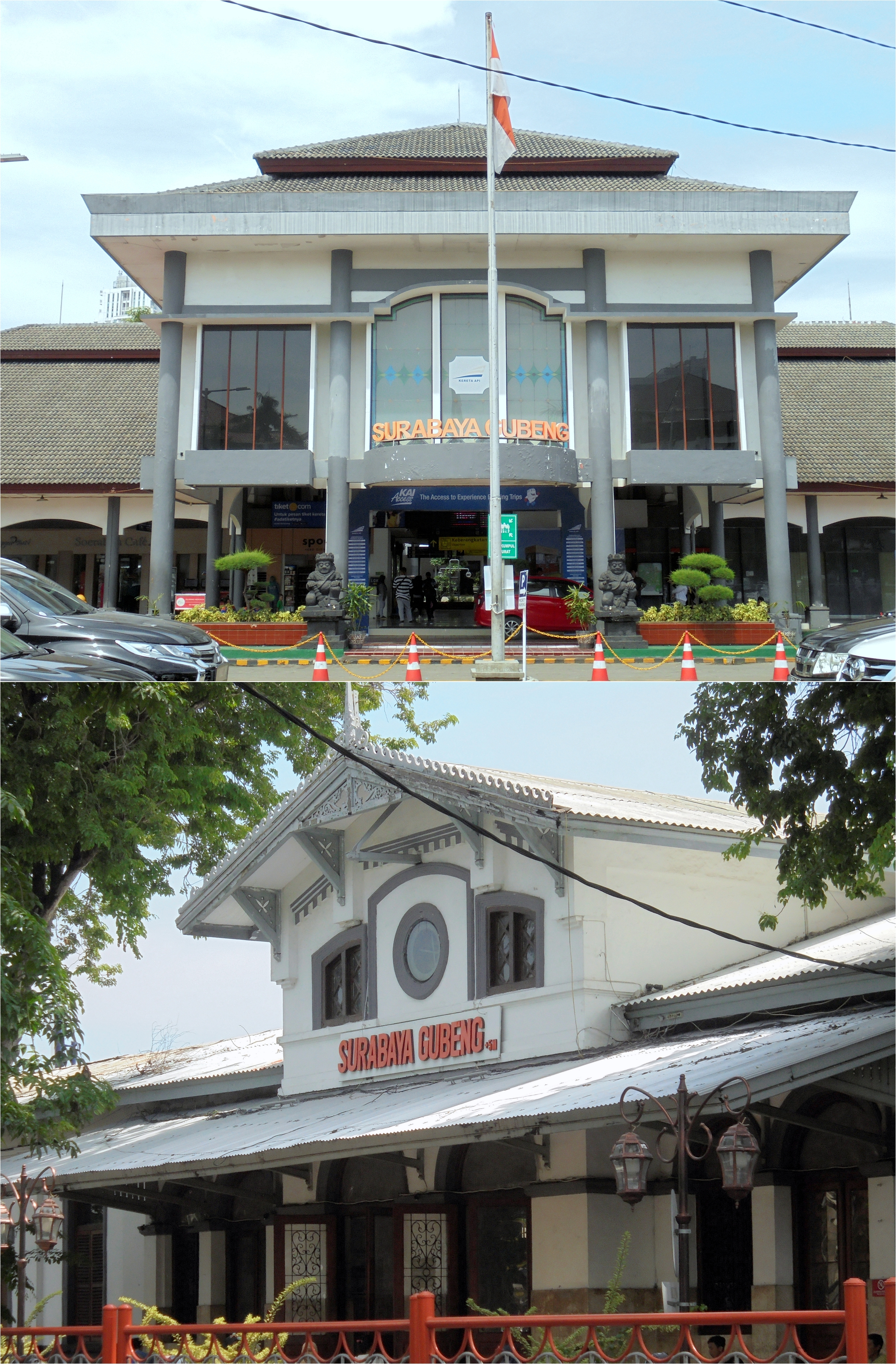 Tampak depan Stasiun Surabaya Gubeng baru (atas) dan lama (bawah) tahun 2020